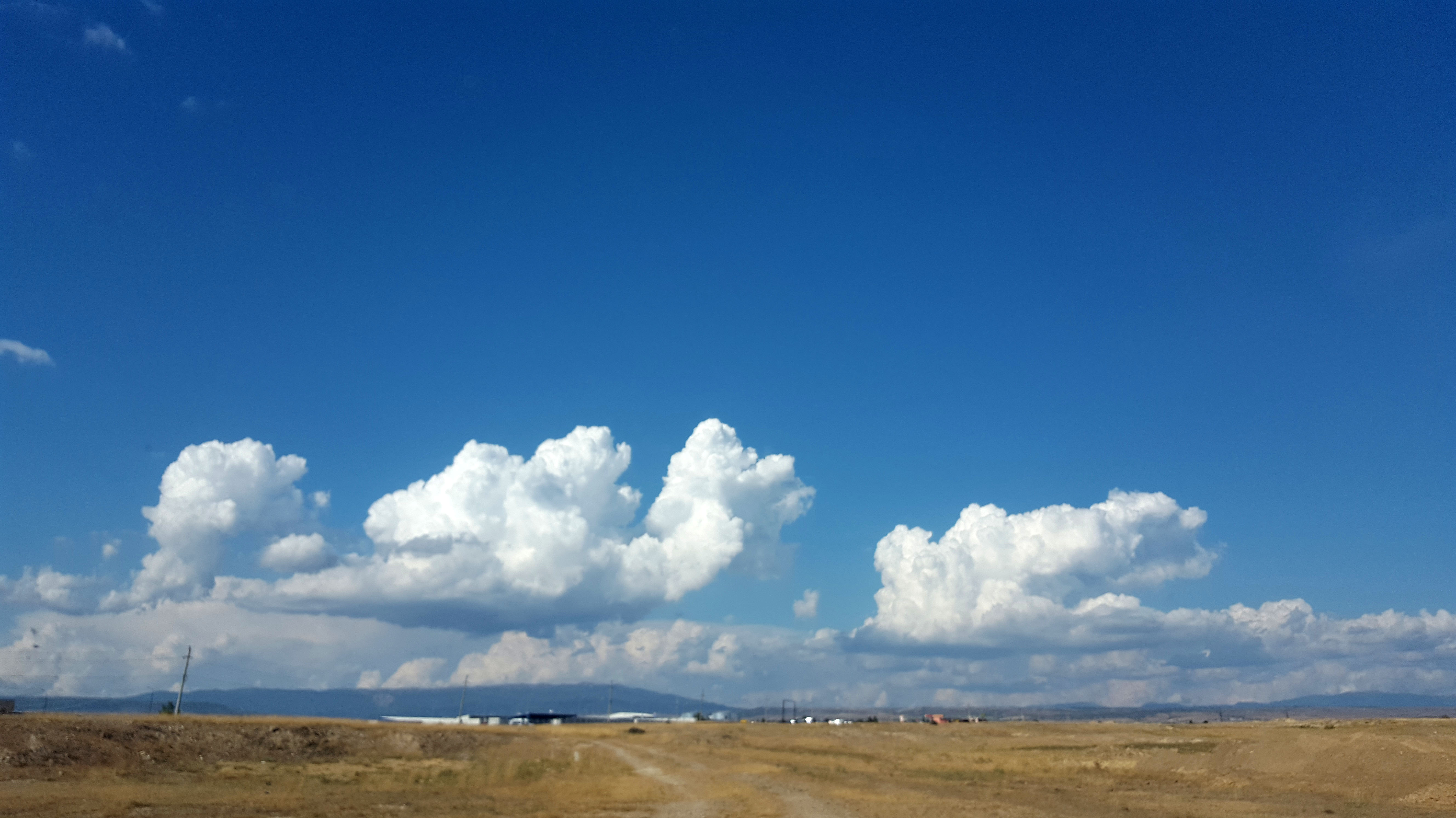 გაჩიანის ველი